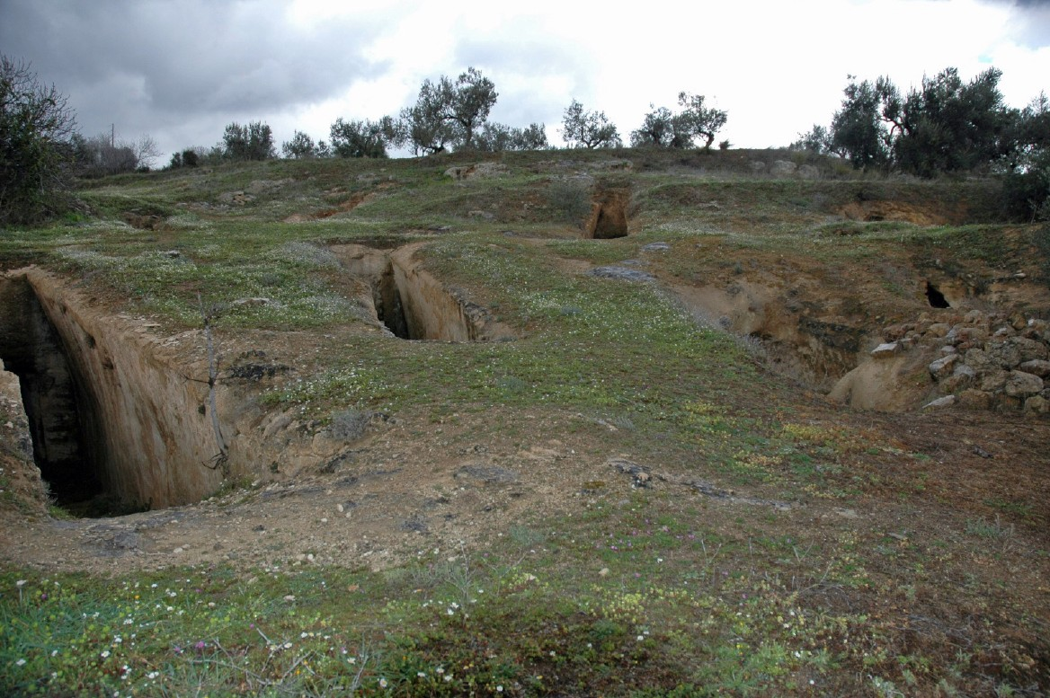 Das mykenische Gräberfeld von Aidonia. Links sieht man den Eingang zu Kammergrab Nr. 9 und daneben von Kammergrab Nr. 8. In der Mitte hinten liegt Kammergrab Nr. 7. Rechts sieht man das eingestürzte Kammergrab Nr. 17 und noch weiter rechts der Eingang zu Kammergrab Nr. 1.